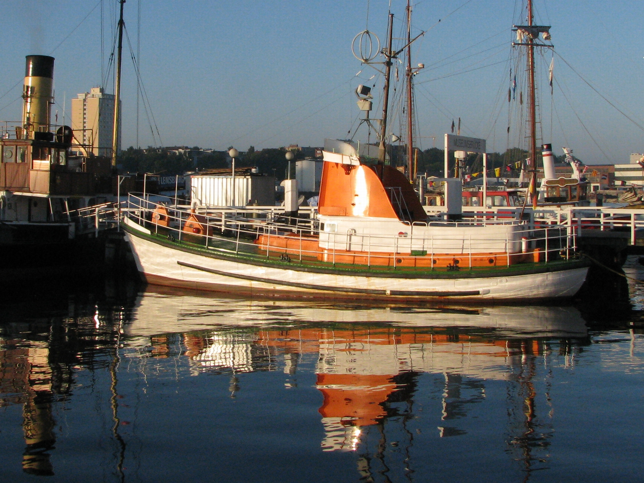 Kiel an der Museumsbrücke: Museumsschiff "Hindenburg" 1944 in Dienst gestellt, ehemaliges Motorrettungsboot MRB Hindenburg der DGzRS - Foto 2010 Wolfgang Pehlemann Steinberg/Ostsee IMG 5824